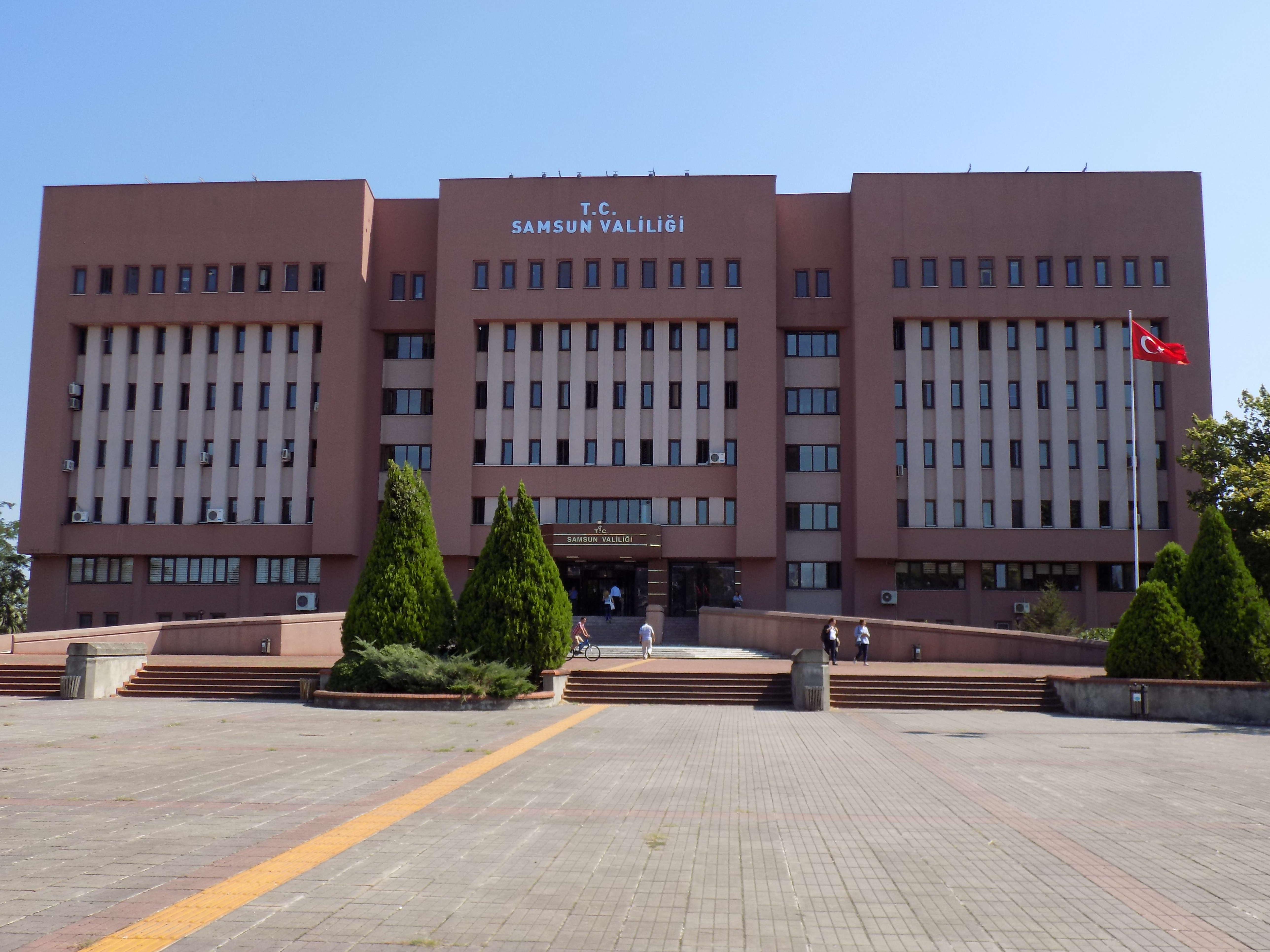 Samsun valilik binasının cepheden görünümü.